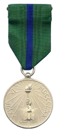 condecoracion 27 de junio